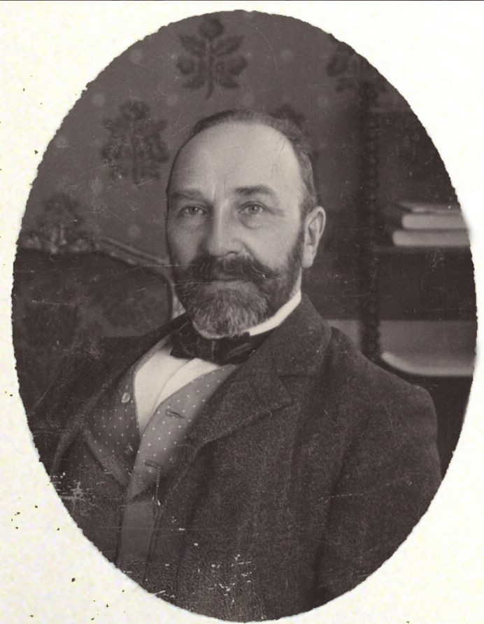 Konseilspræsident og Udenrigsminister: J.H. Deuntzer - politician